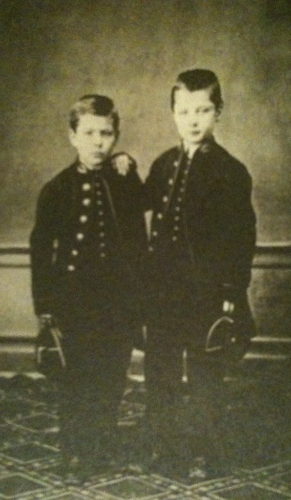 Jules Laforgue et son frère âiné Émile en uniformes de pensionnaire au lycée de Tarbes, 1867 (fonds Mme Marie Laforgue-Labat, reprint en héliogravure, 1922).